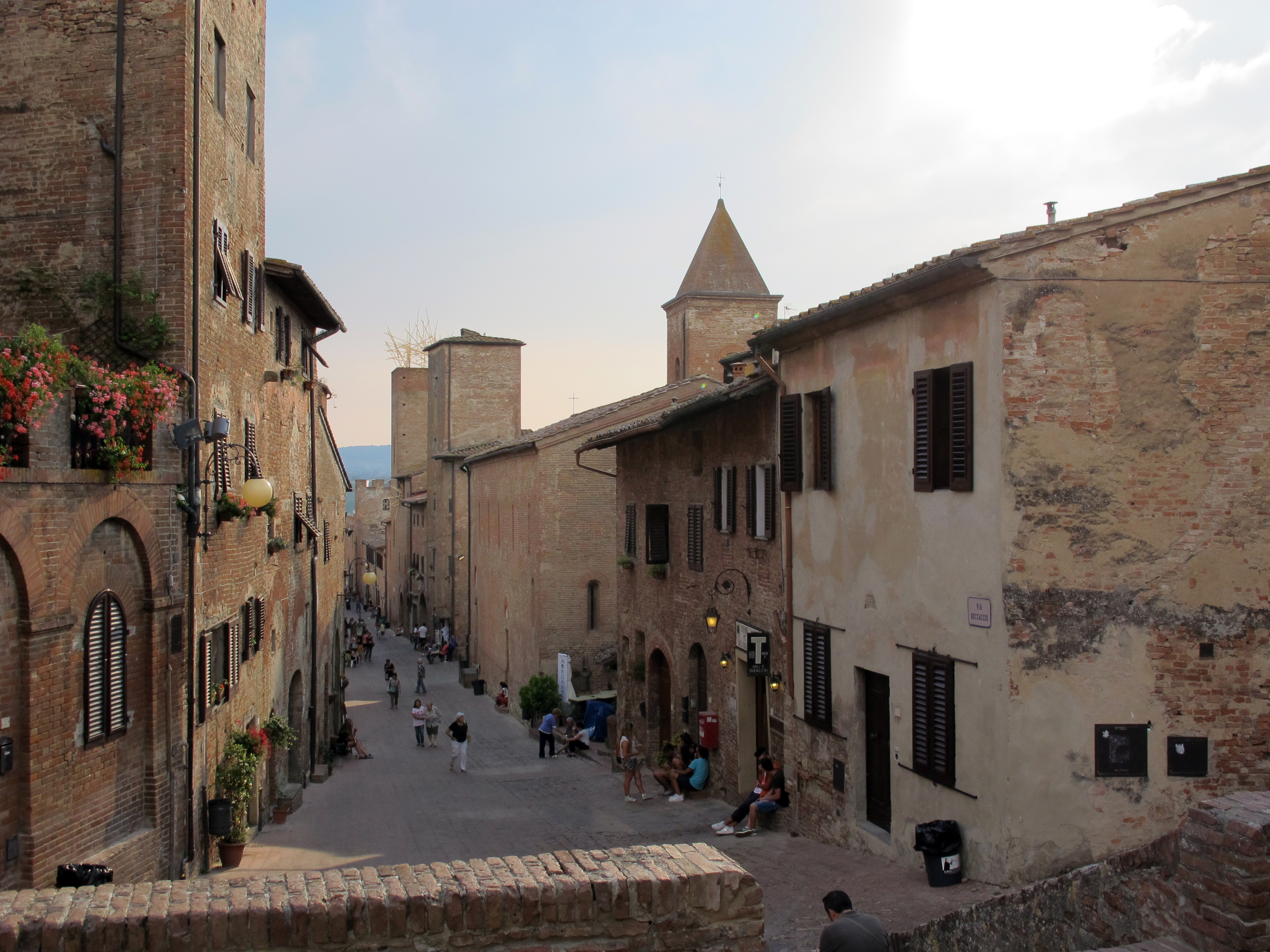 Certaldo alta, sant'agostino